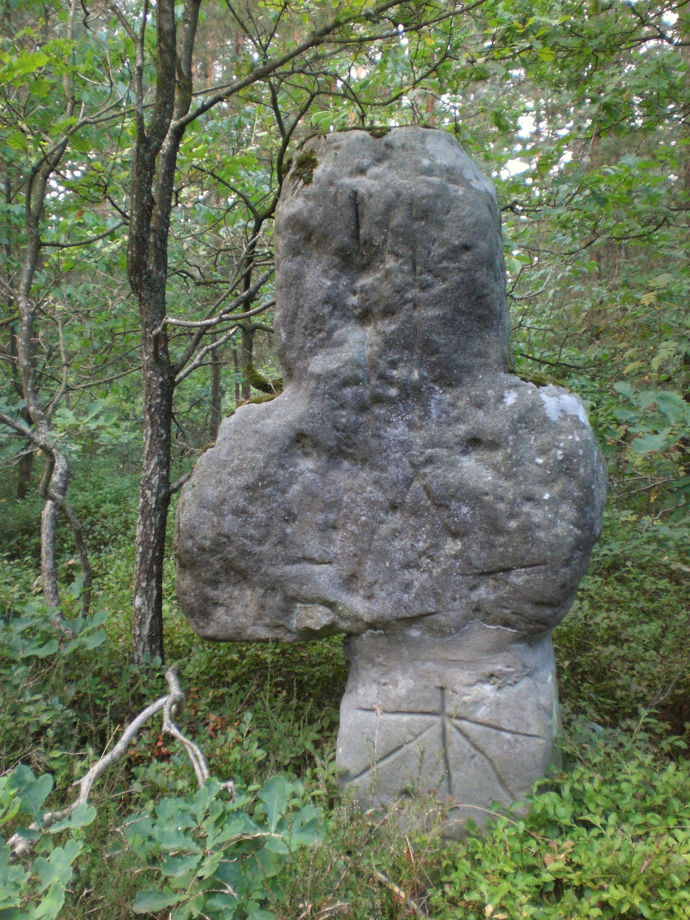 Steinkreuz nahe Röthenbach bei Altdorf